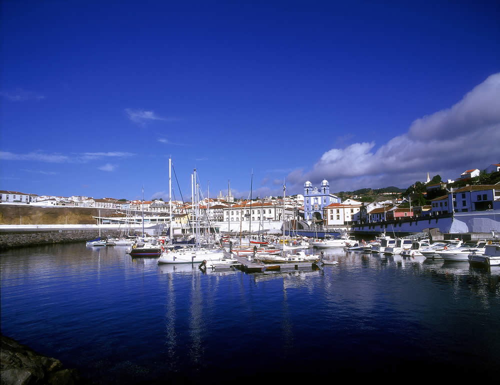 Baía de Angra do Heroísmo, ilha Terceira, Açores, Portugal.